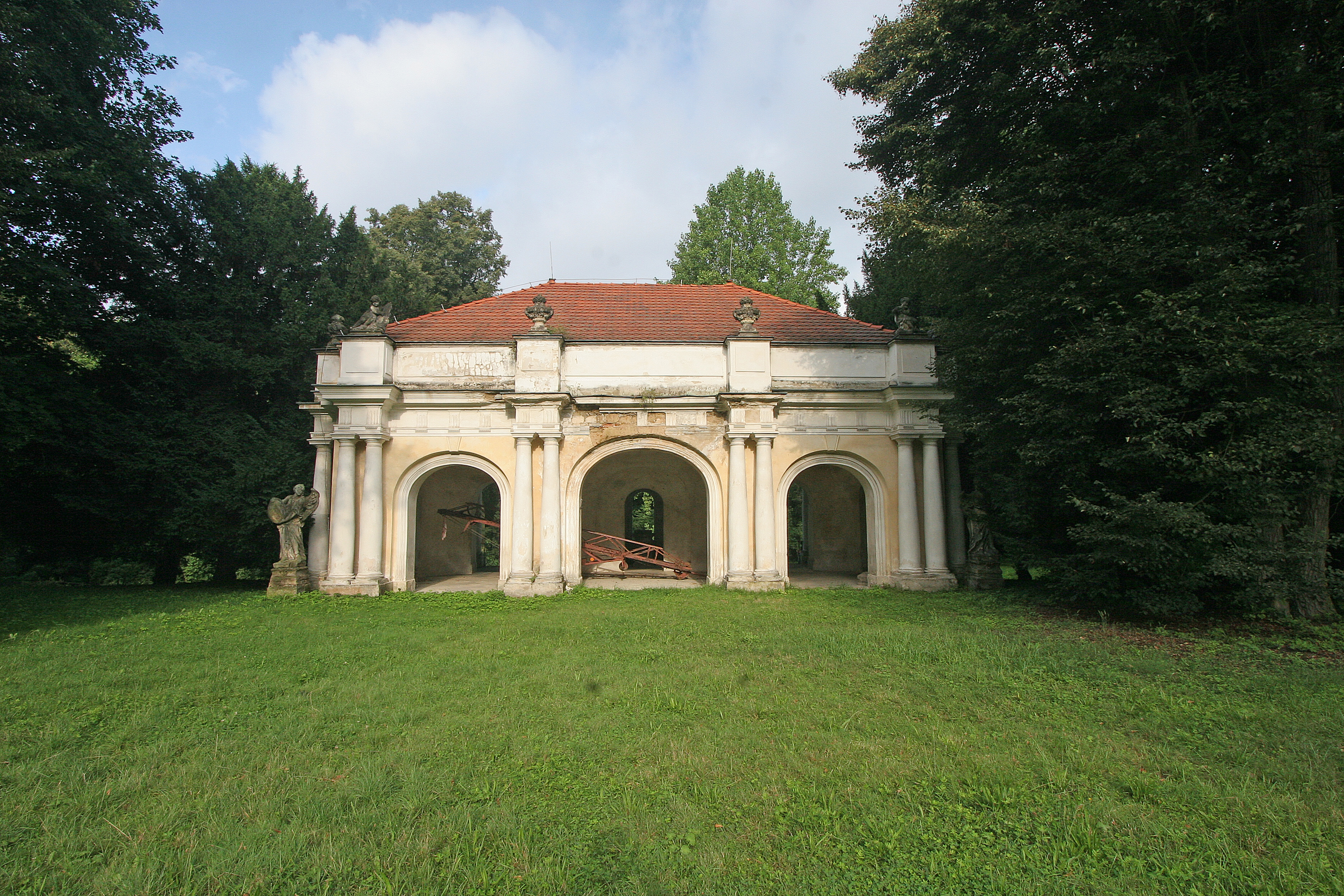 Klášter (Doksany), Doksany 1, zahradní pavilon